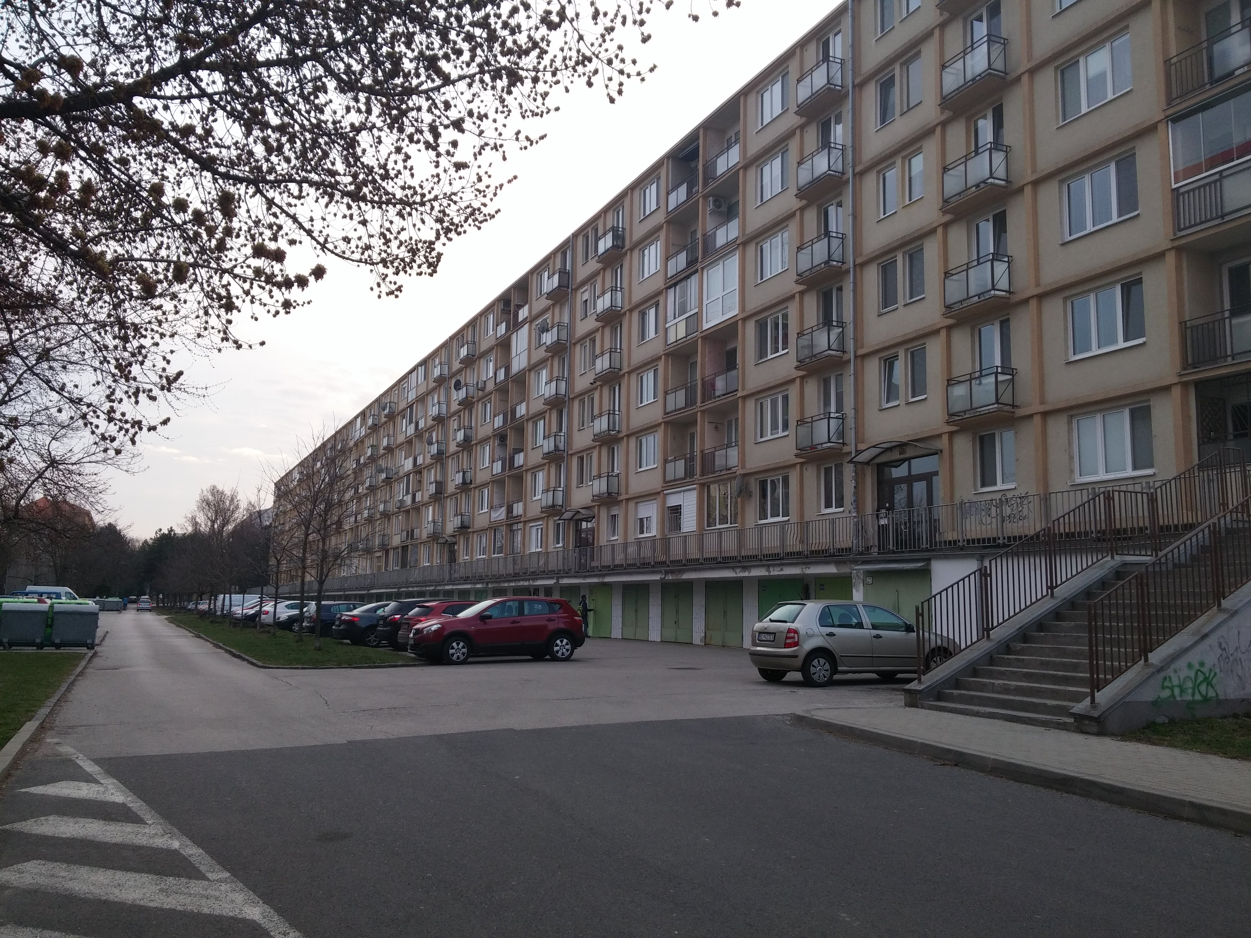 Thurzova, Nové Mesto, Bratislava